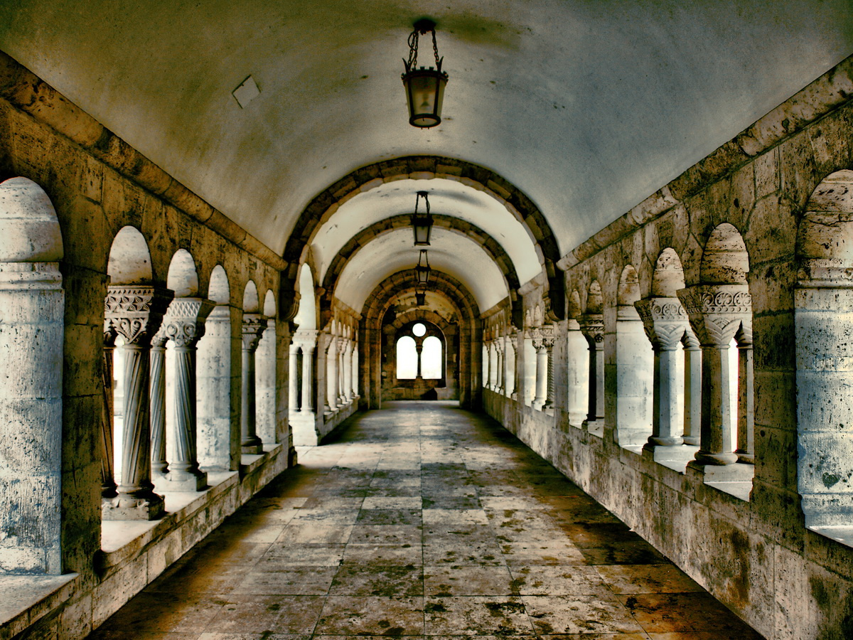 Halászbástya épülete díszlépcsővel (Budapest 1, Halászbástya) This is a photo of a monument in Hungary. Identifier: 103